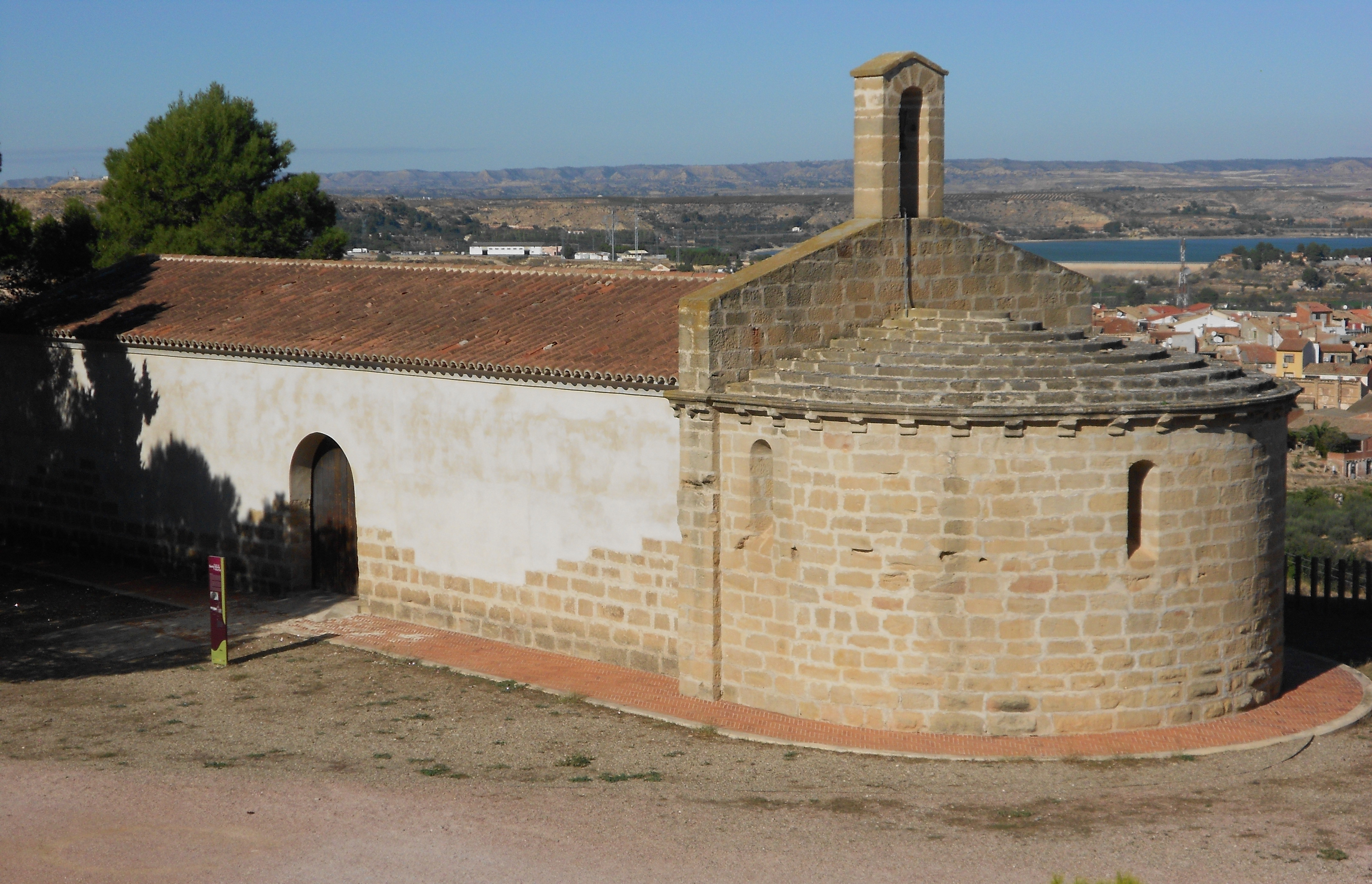 Ermita de Santa María de Horta (Caspe, Aragón)